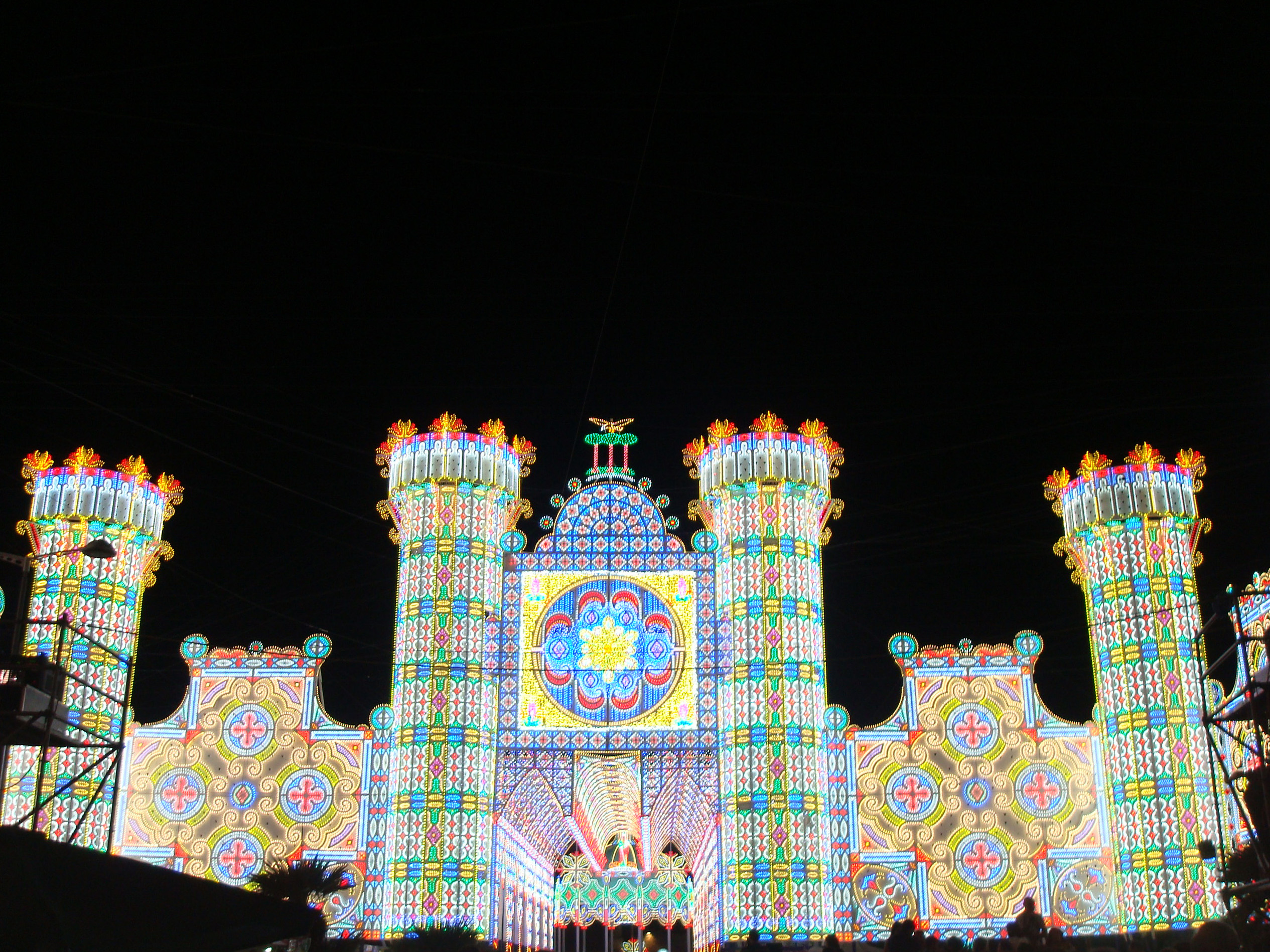 luminarie per la festa di santa domenica 2013 (maschio angioino) ps. questa nuova versione usando la macchinetta di Chiara Albanese è uscita meglio